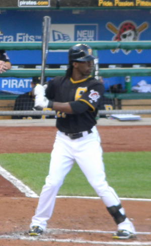 Andrew McCutchen